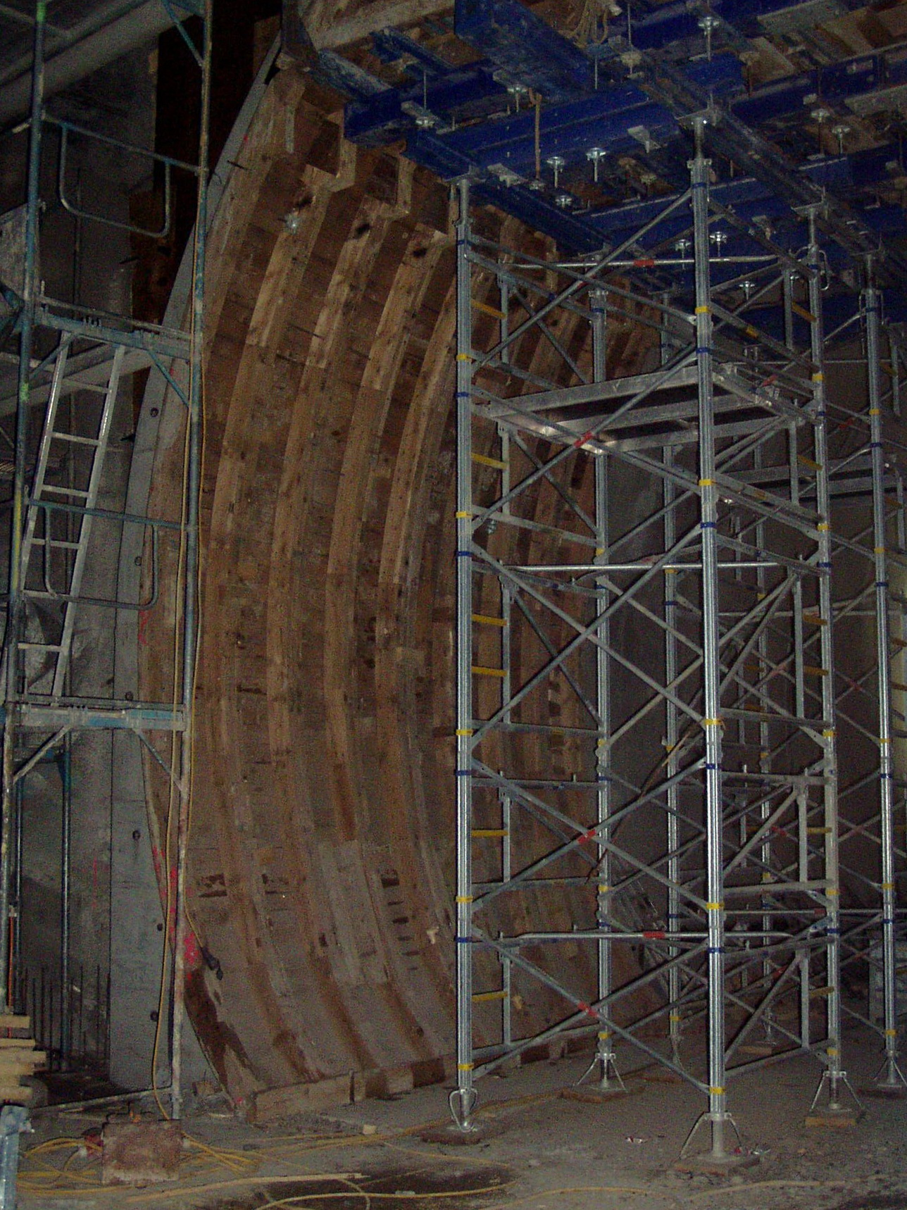 Portal des Mainzer Südtunnels, vom Einschnitt Eisgrubbräu aus gesehen. Zustand am 4.2.2009